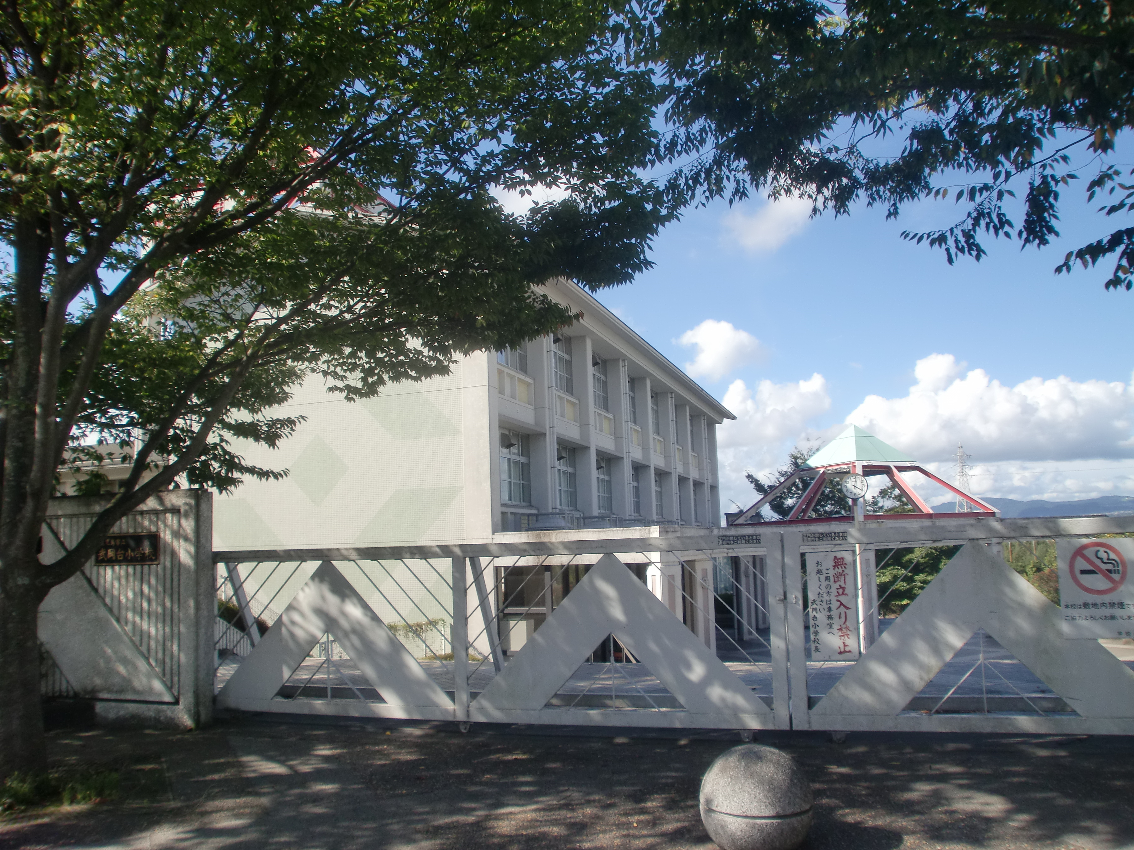 鹿児島市立武岡台小学校の外観。